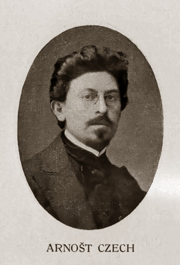 Arnošt Czech z Czechenherzu (1878 - 1951), Český básník, prozaik a dramatik.